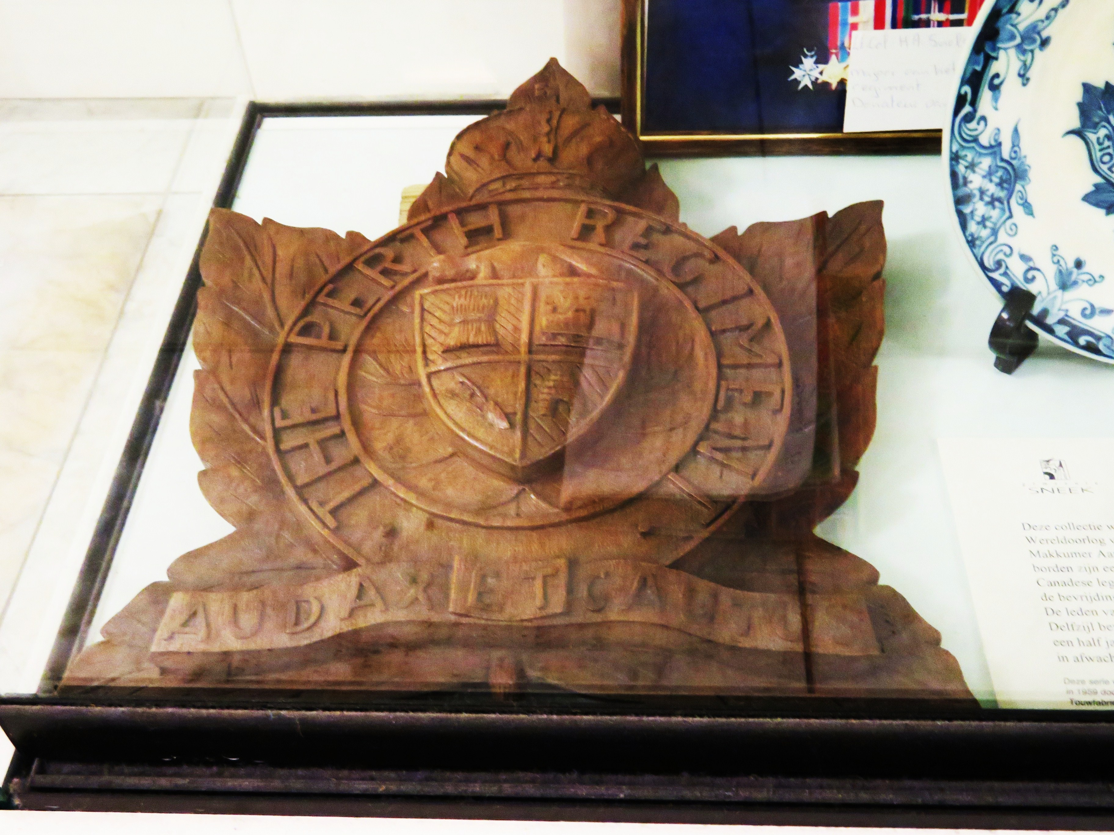 Houtsnijwerk Perth Regiment in het Stadhuis te Sneek 1945